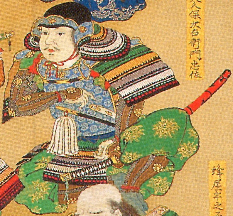 大久保忠佐の肖像。